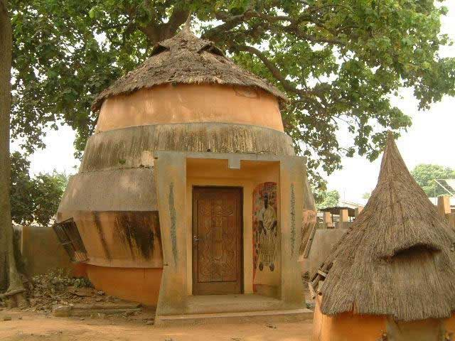 Temple du Python à Ouidah. Le Python est une divinité au même titre que le Vodoun. Les deux ne font pas partie de la même croyance.